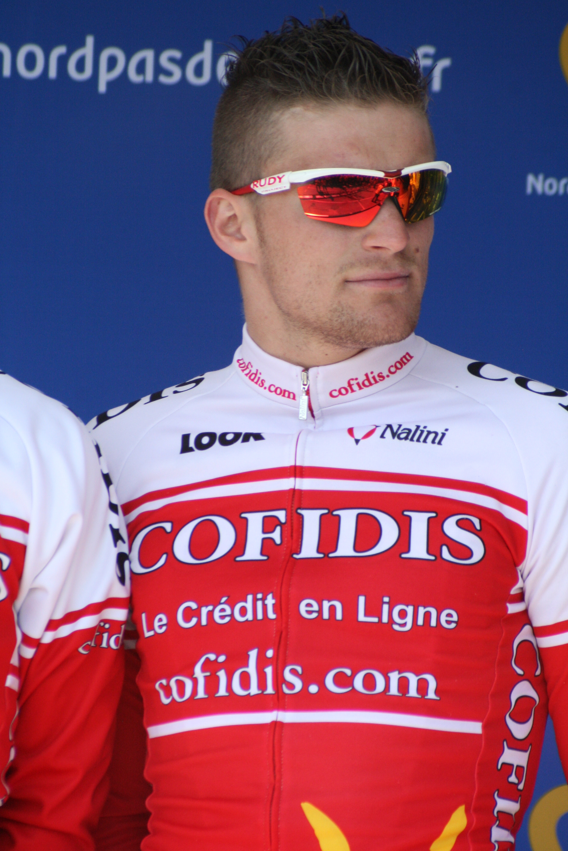 Présentation des coureurs au départ de la première étape Adrien Petit